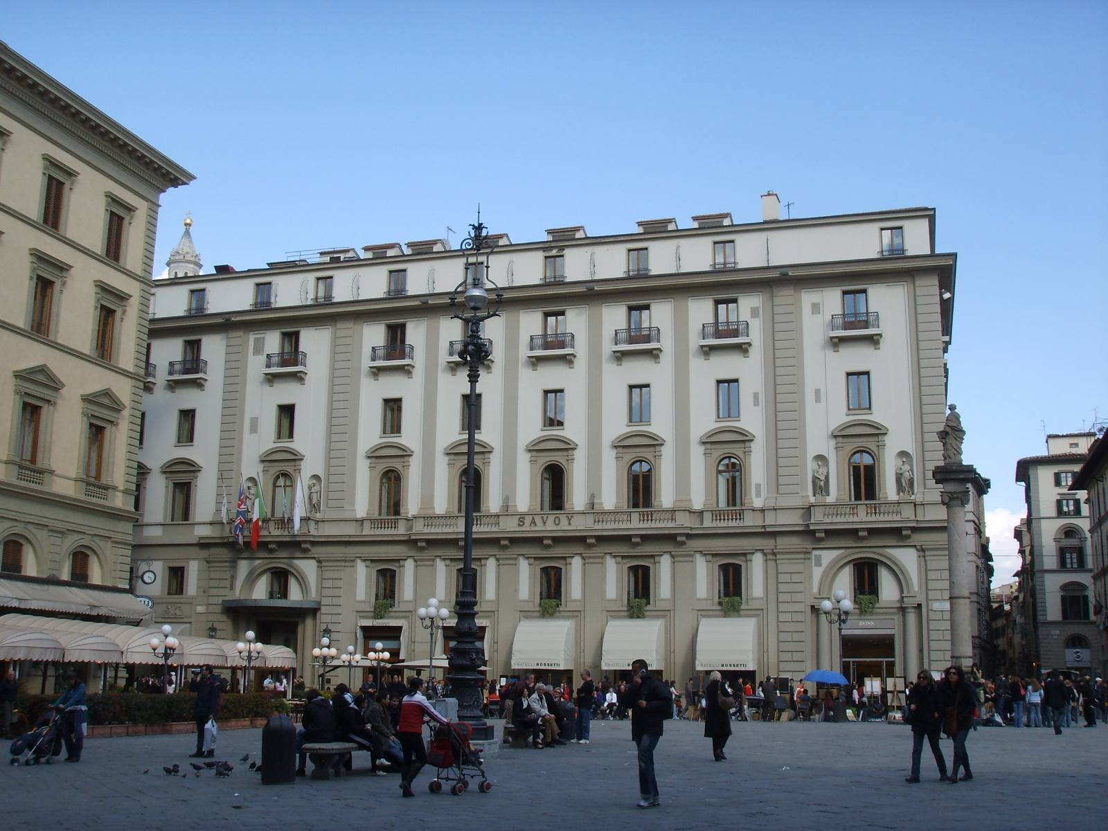 Piazza delle repubblica